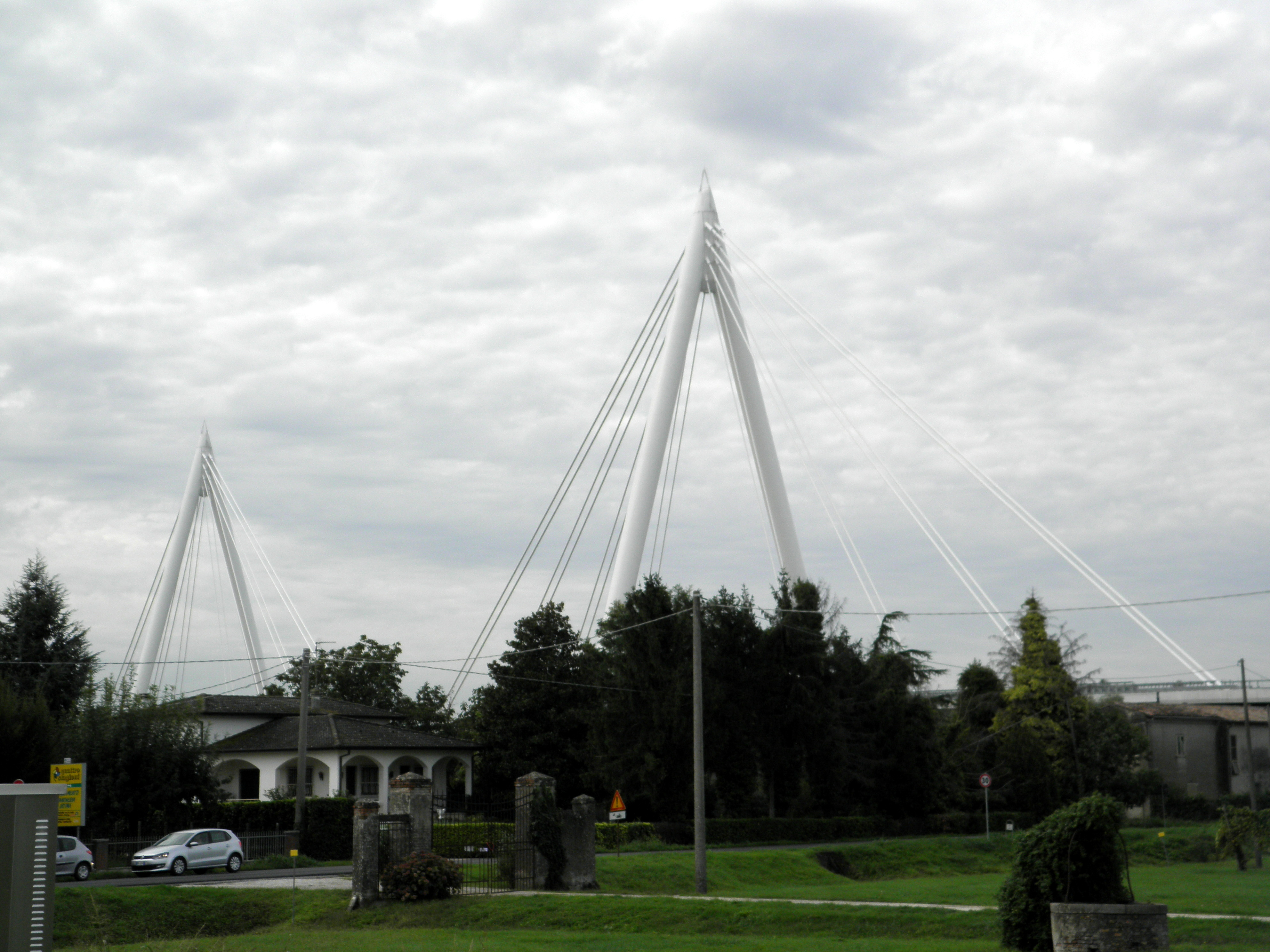 Piacenza d'Adige: Autostrada A31, il ponte strallato sul fiume Adige.